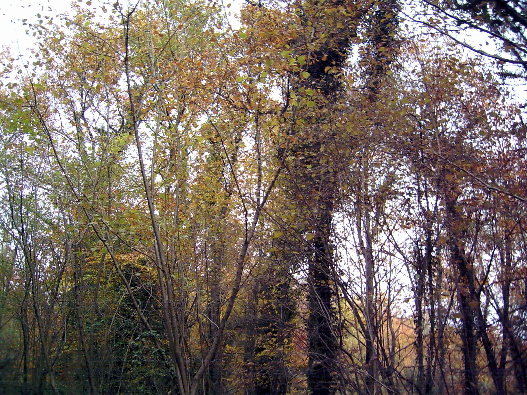 La Fageda d'en Jordà (Espanya) - Poesia de Joan Maragall.